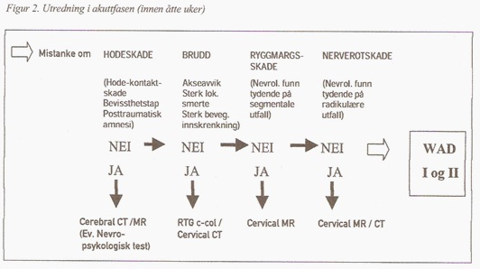 Utredning i akuttfasen